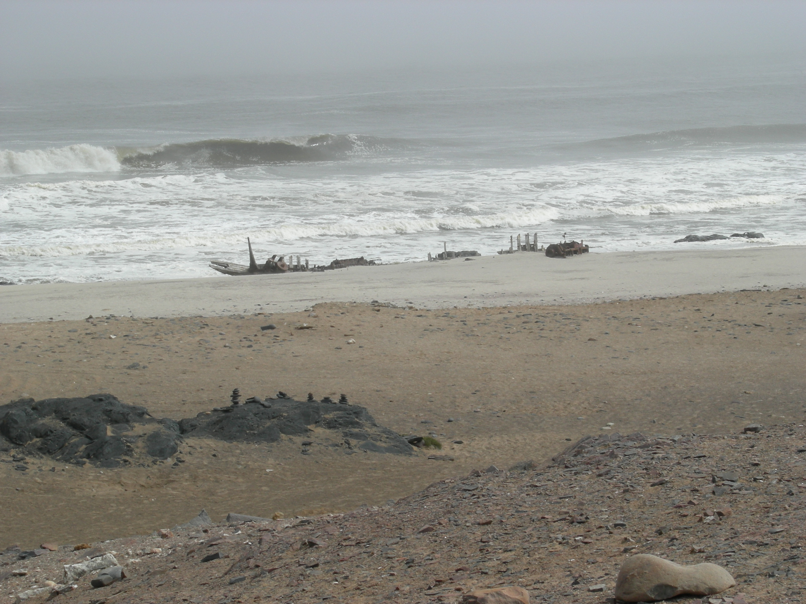 Namib Skeleton Coast Park, Namibia